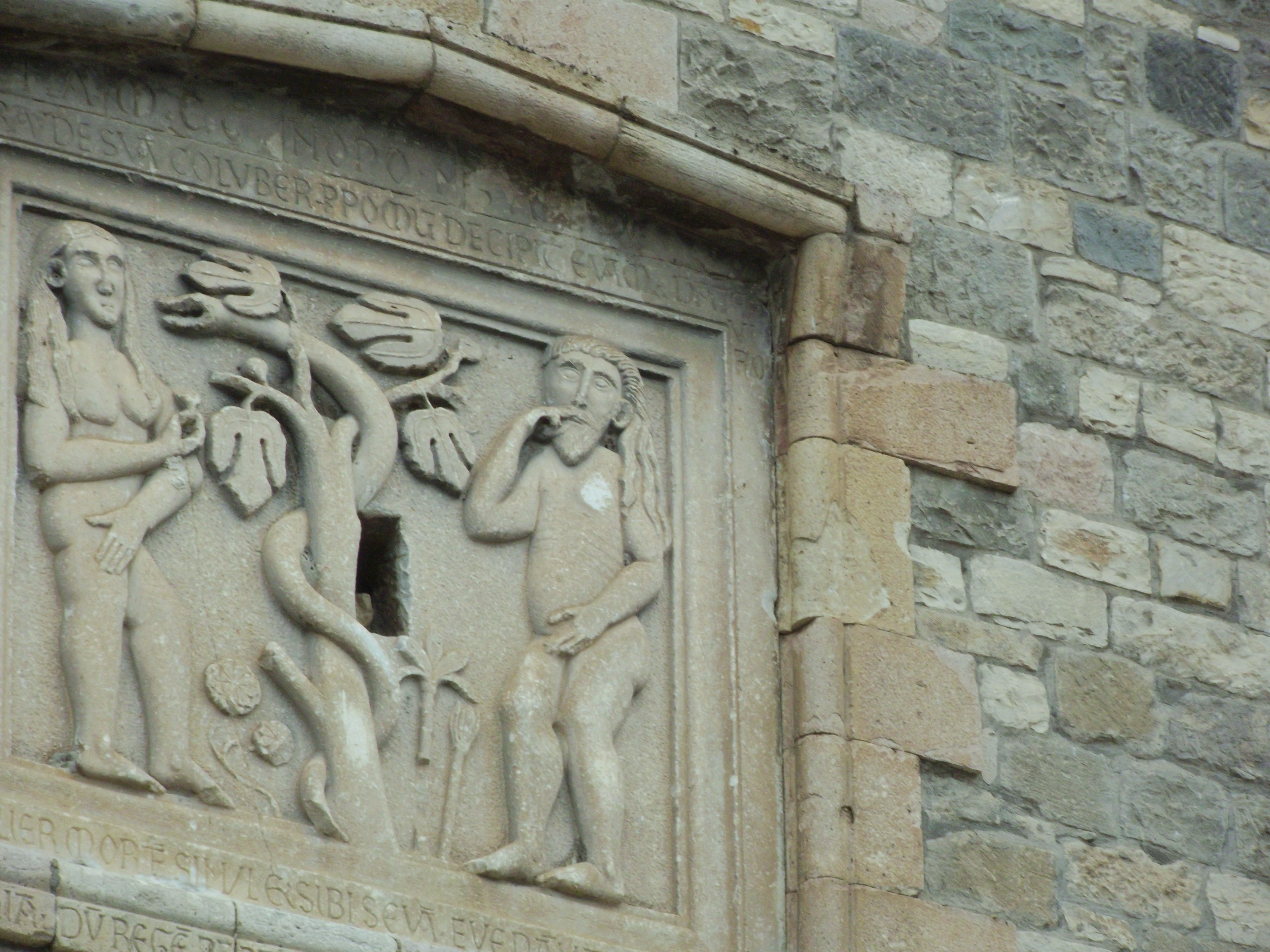 bassorilievo di Adamo ed Eva nel fianco destro del Duomo di Rapolla